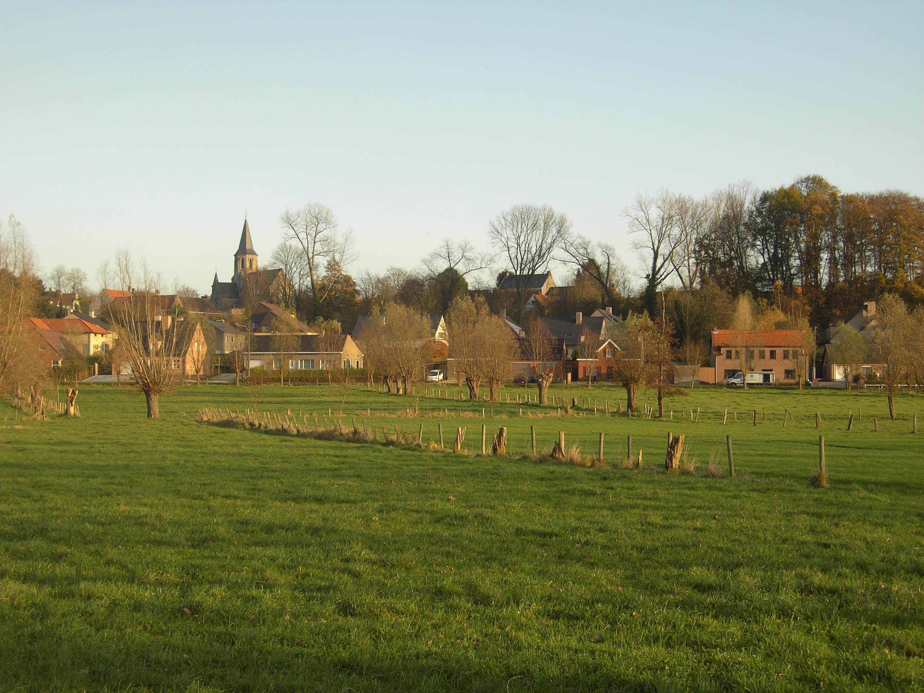 Semmerzake - Gavere - Belgium - algemeen zicht